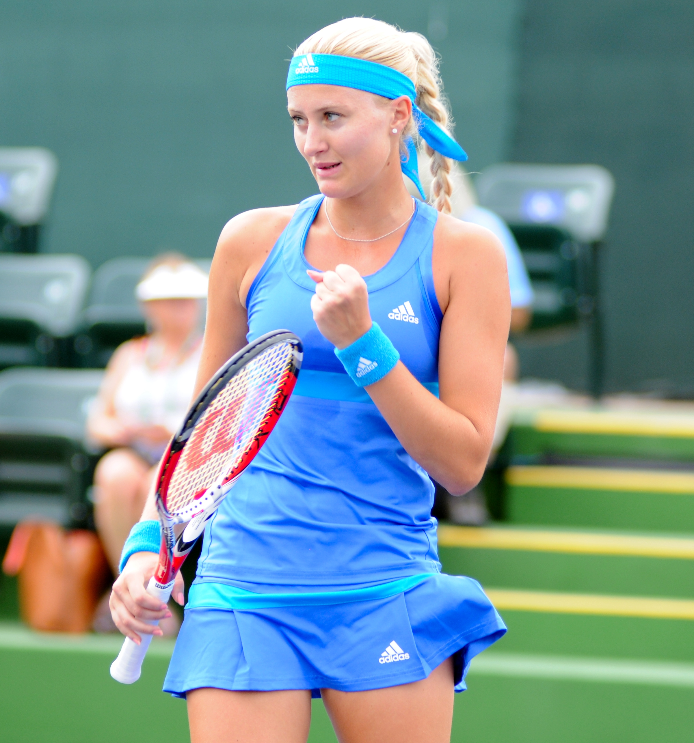 2014 BNP Paribas Open